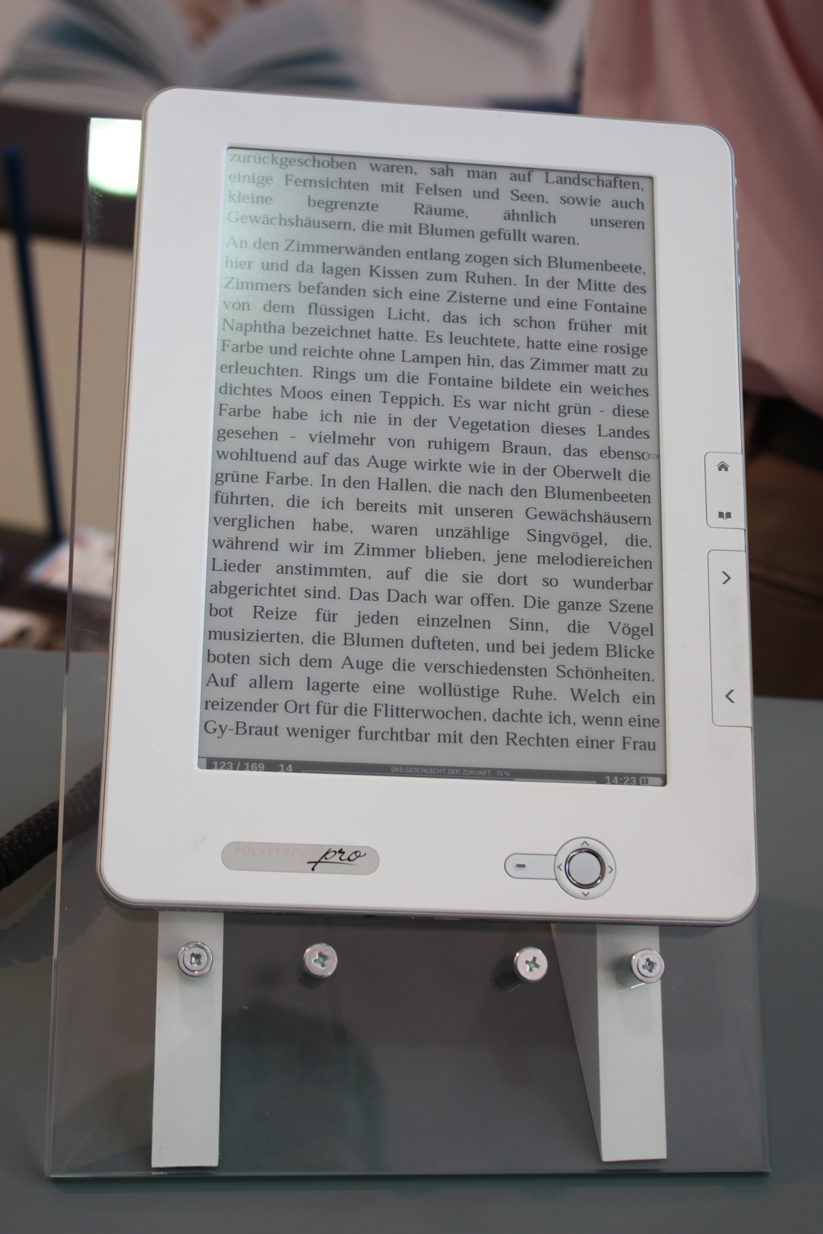 IFA 2010, Berlin